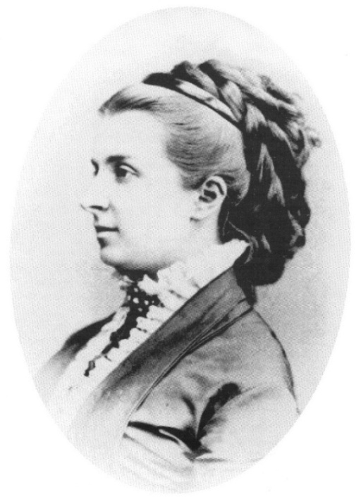 Екатерина Борисовна Татищева, урожденная княжна Мещерская (1848-1930)- фрейлина, супруга полтавского губернатора Александра Никитича Татищева